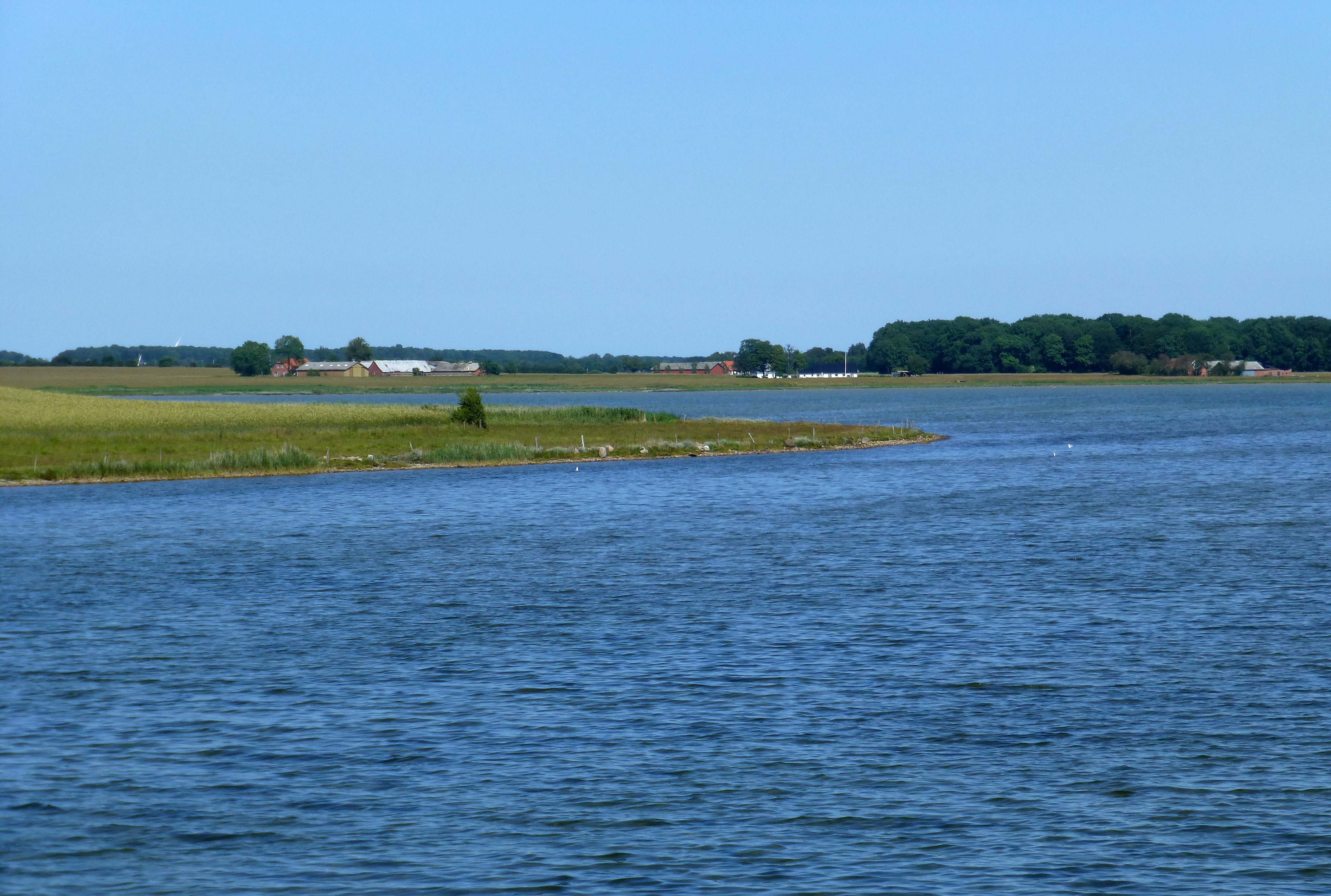 Lerdrup Bugt i Horsens Fjord, set fra Alrødæmdingen